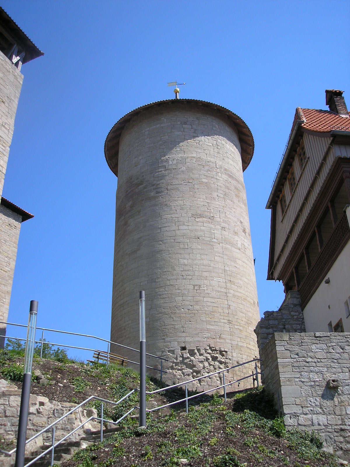 Der Rundturm auf der Burg Normannstein bei Treffurt (Thüringen).